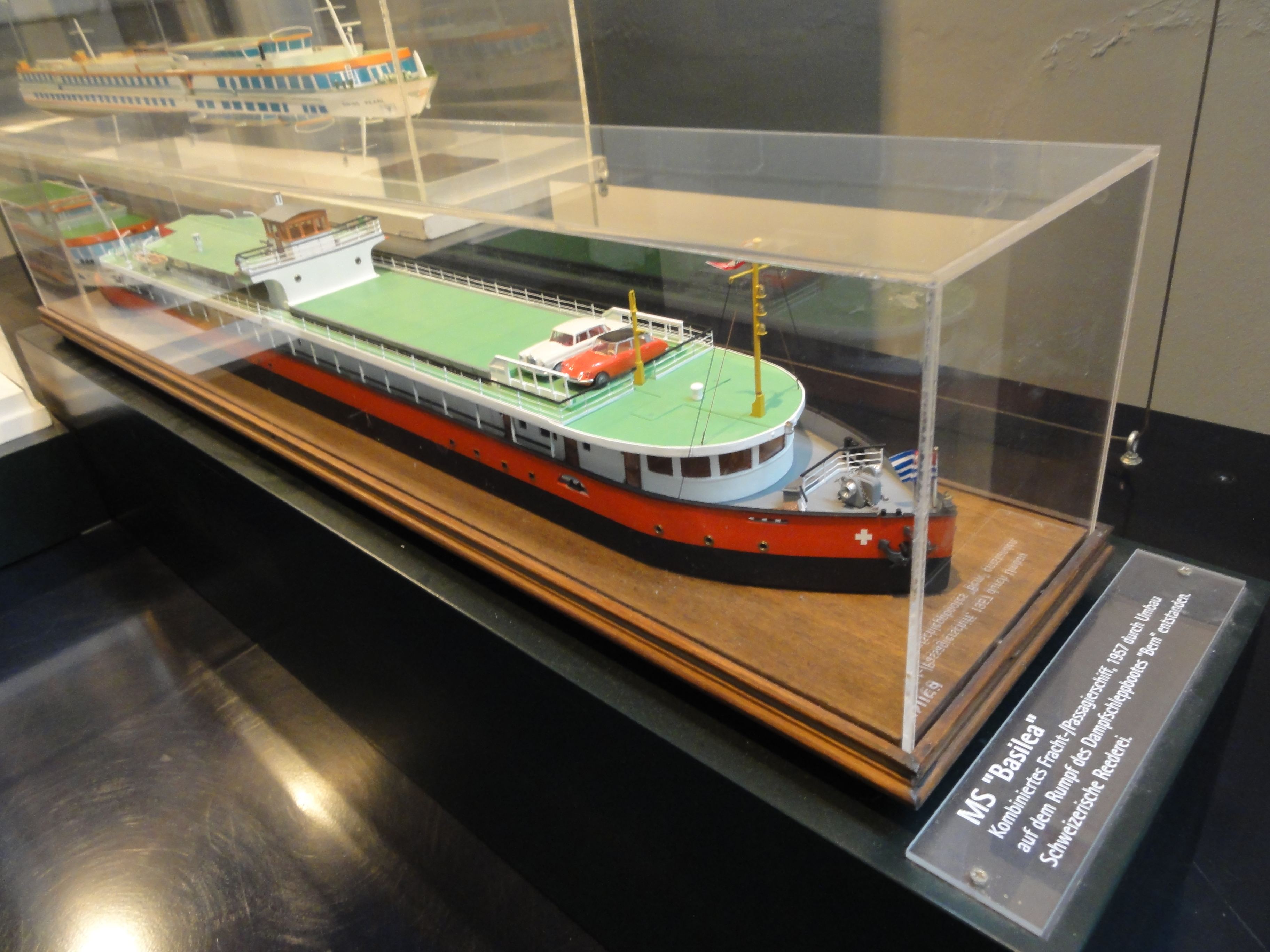 Basel — Verkehrsdrehscheibe Schweiz und unser Weg zum Meer